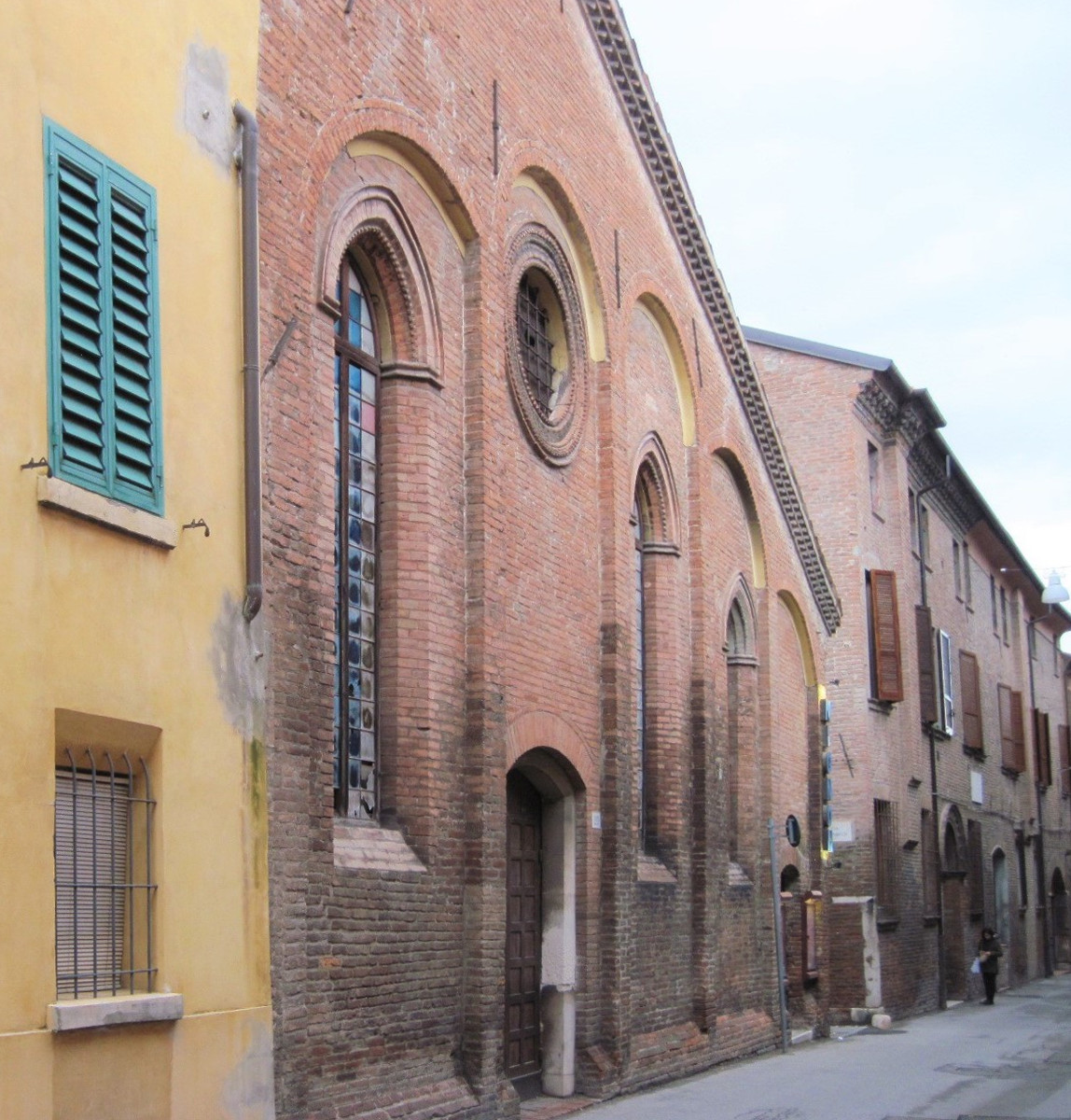 Chiesa sconsactata di San Pietro, a Ferrara. Ora è un cinema a luci rosse